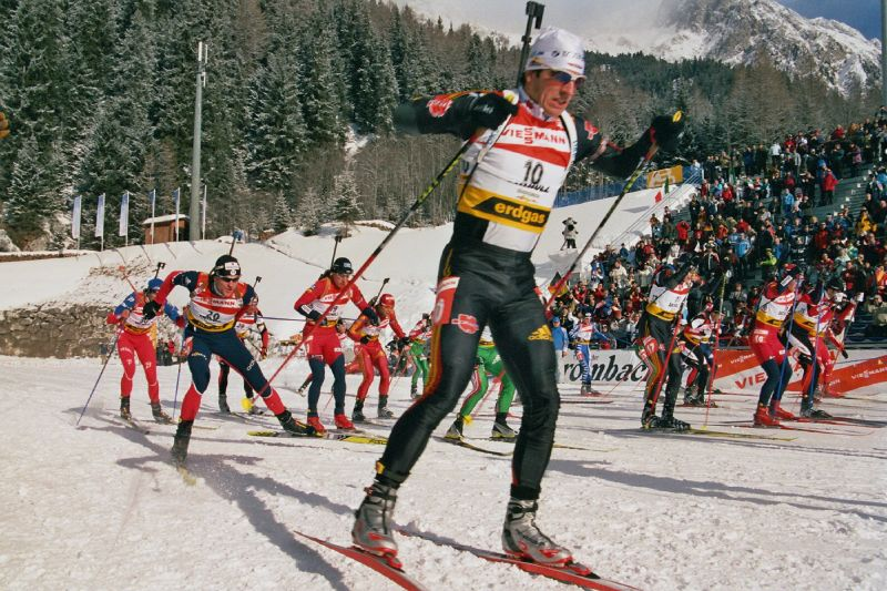 Ricco Gross (bib 10), Julien Robert (bib 20)